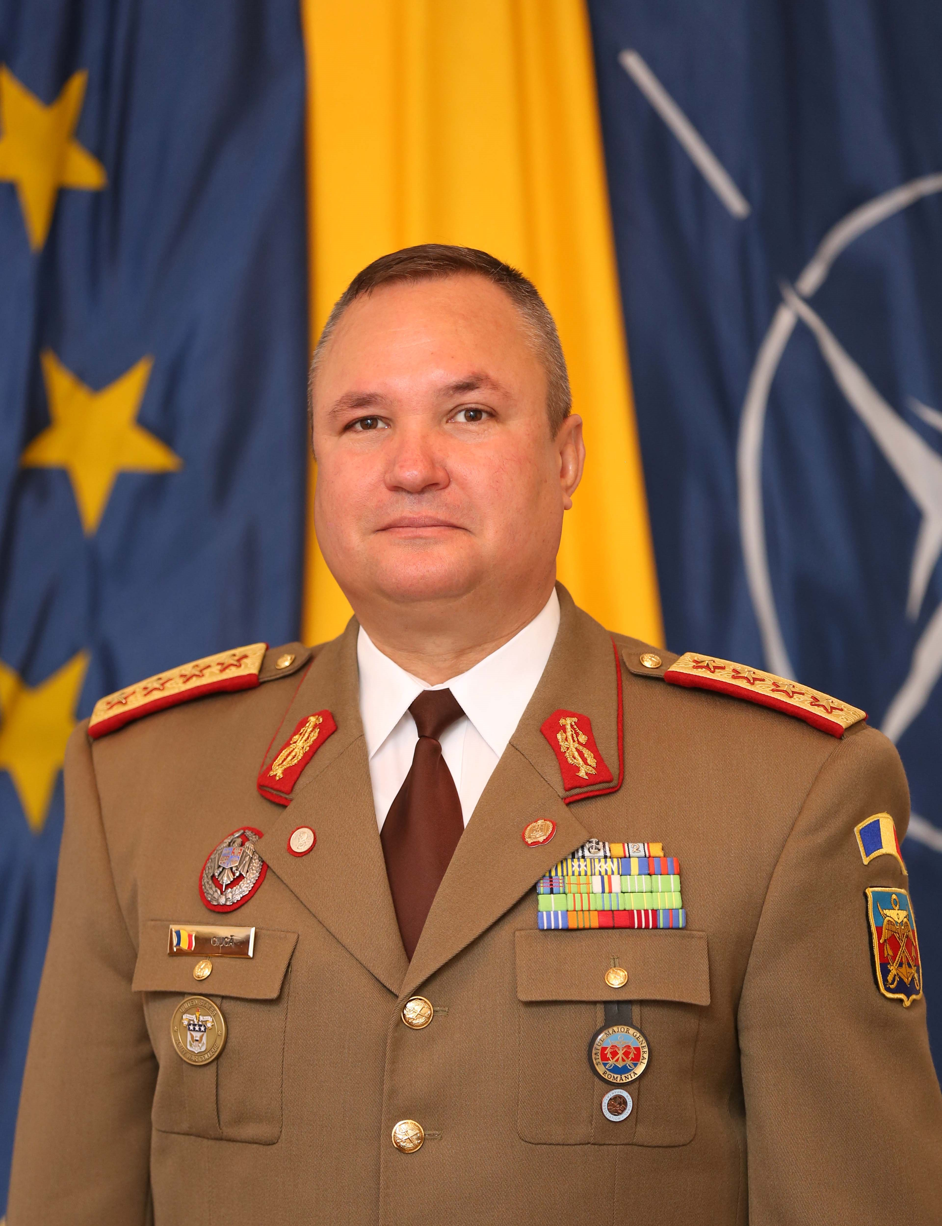 General Nicolae Ciucă, Șeful Statului Major General